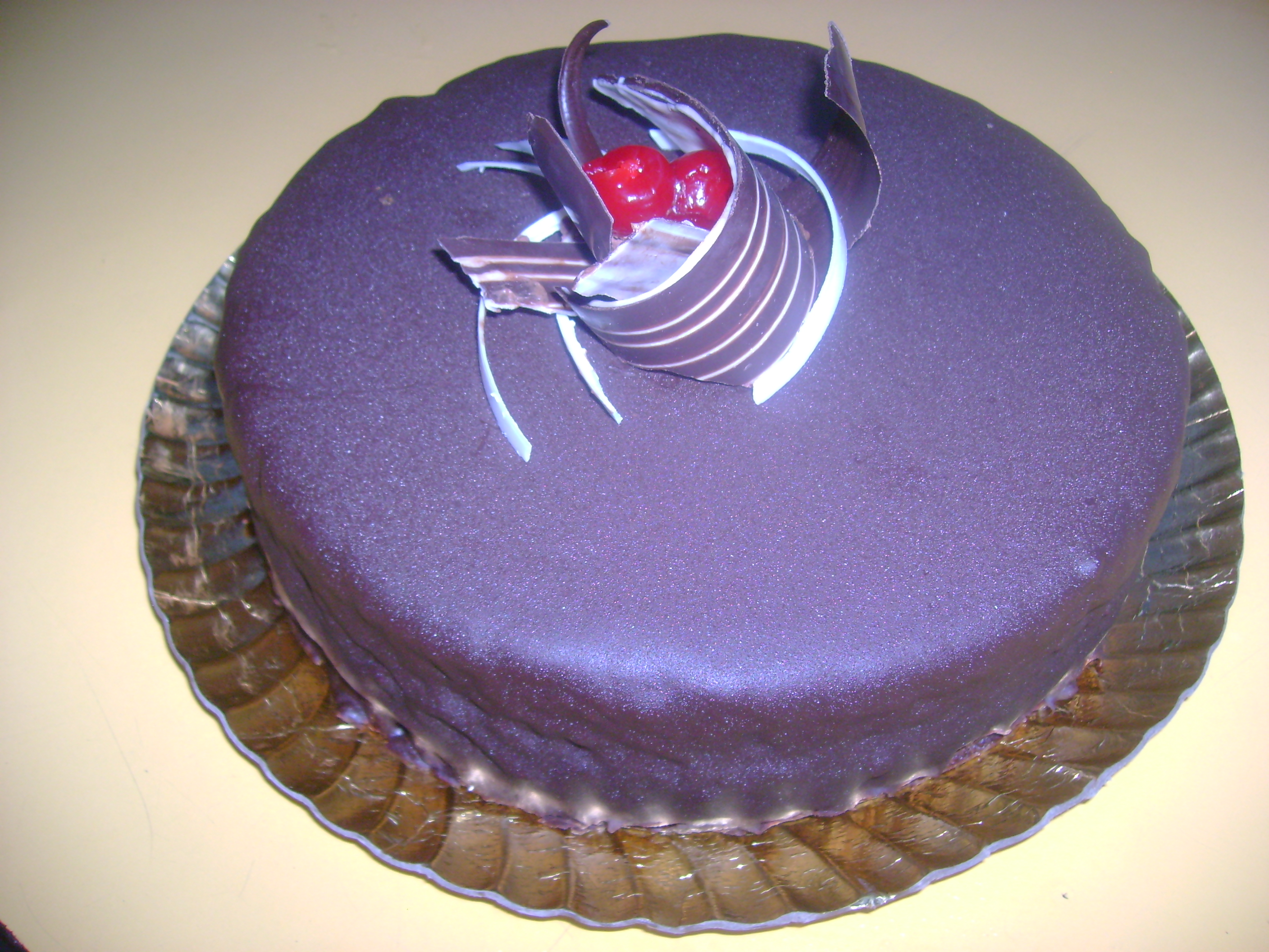 Sachertorte